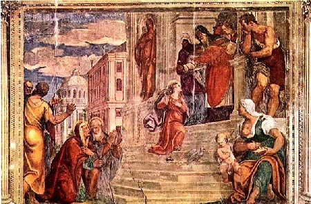 Padova - Scuola della carità Dario Varotari il Vecchio affresco - 1579